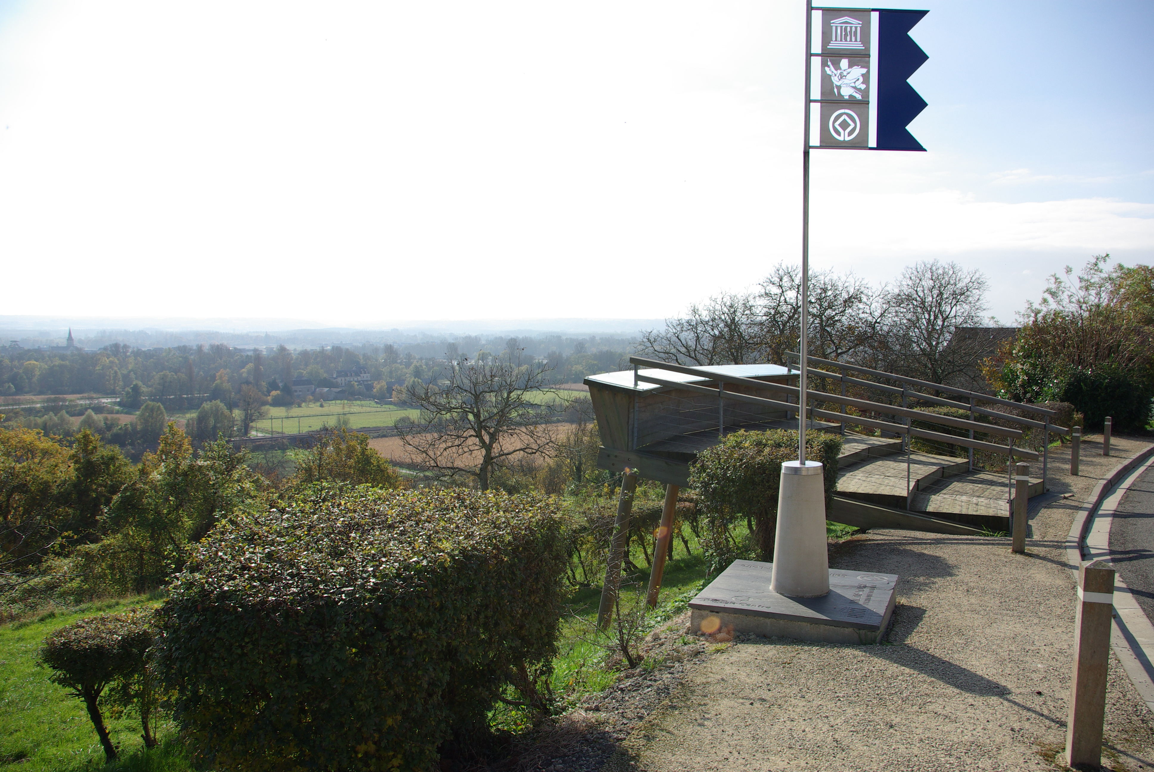 Panoramic viewpoint of Saint-Michel-sur-Loire Belvédère de Saint-Michel-sur-Loire